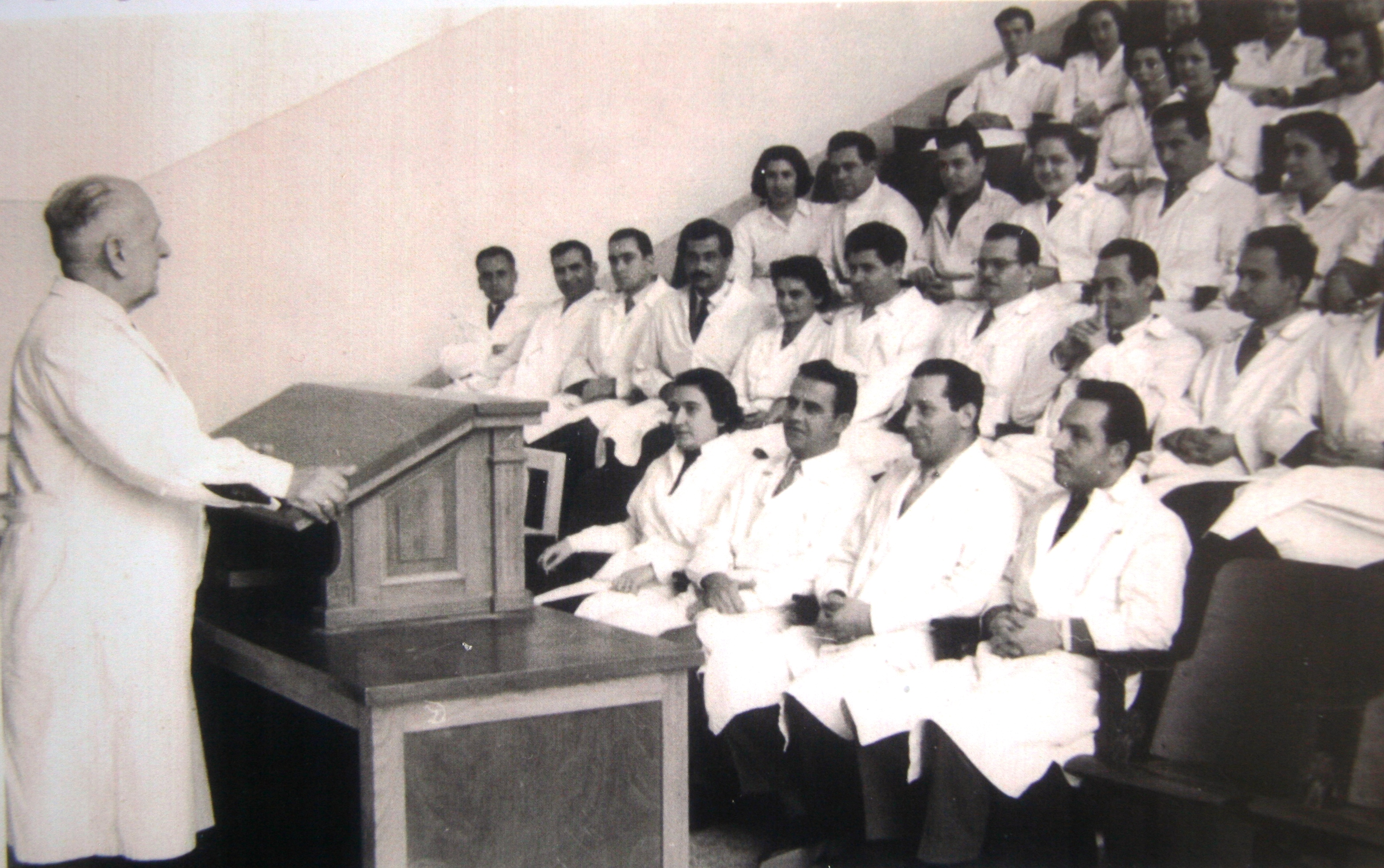 καθηγητής Κάρολος Αλέξανδρίδης, διδασκαλία παθολογίας από αμφιθεάτρου στο νοσοκομείο ΑΧΕΠΑ